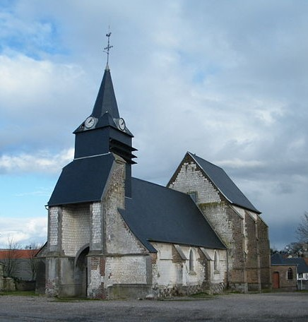 L'église de Woincourt, Somme, France.